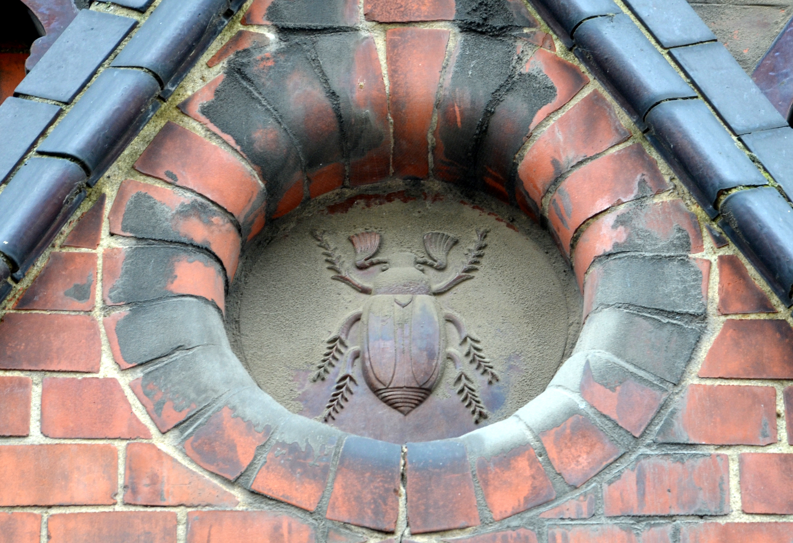 Detail-Blick auf das denkmalgeschützte, in den 1890er Jahren erbaute Haus Jakobistraße 9 Ecke Edenstraße in Hannover, Stadtteil List. Der ehemalige Verwaltungssitz der Fabrik des Heizungsbauers Fritz Kaeferle zeigt über dem Hauseingang das Fabrikzeichen des Maikäfers ...